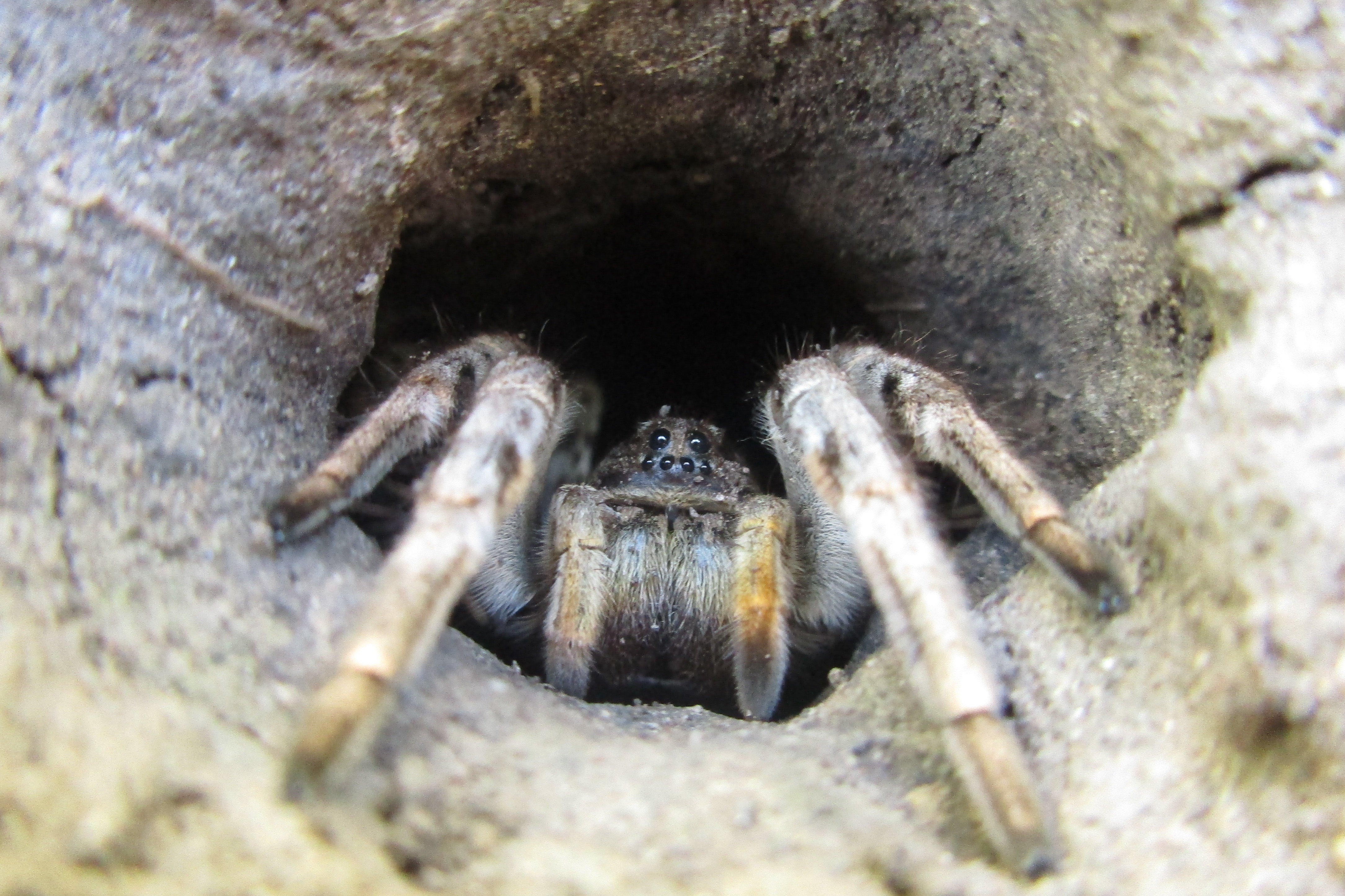 LycosaSingoriensis. Location: Russia / Samara / Spasskoe